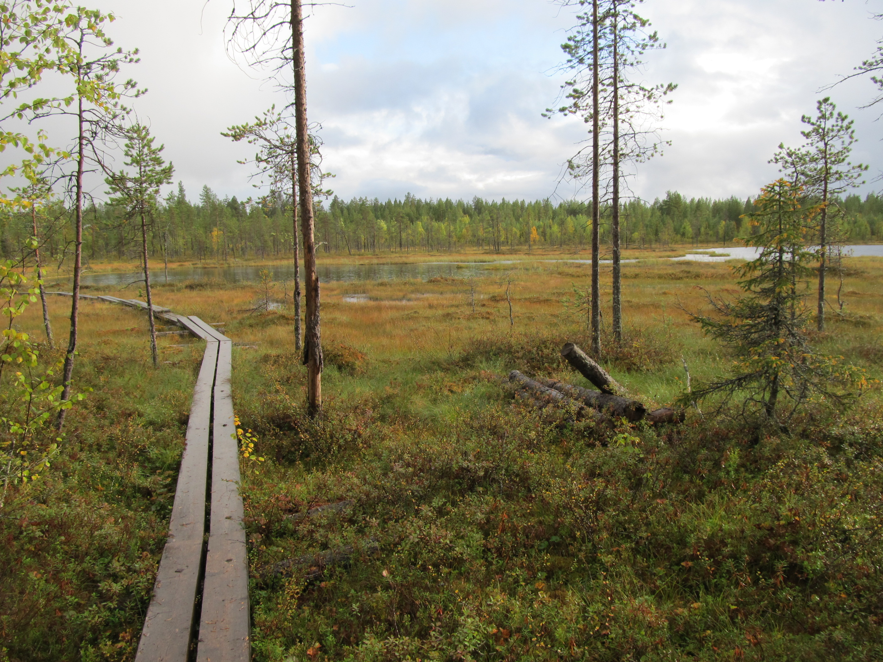 Bohlenweg durch die Moorlandschaft